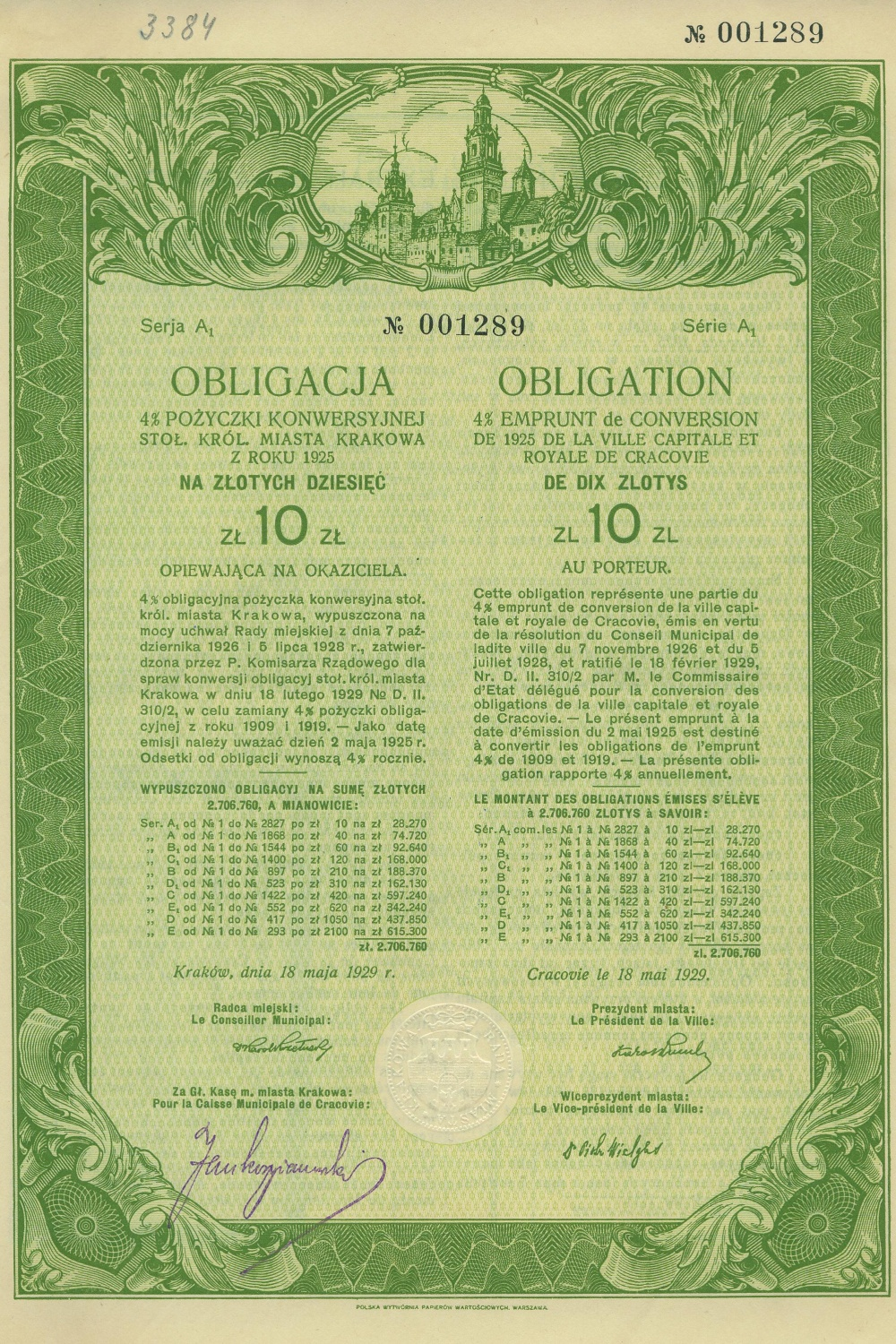 Municipal bond (10 złotys) issued by town Kraków, 1929